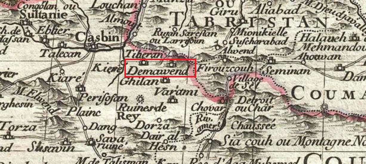 نقشه زمان اواخر صفوی که دماوند نشان داده شده است